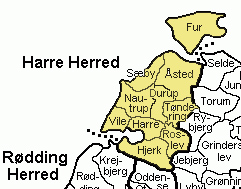 old Viborg Amt, Denmark Source: 'Map by Svend-Erik Christiansen